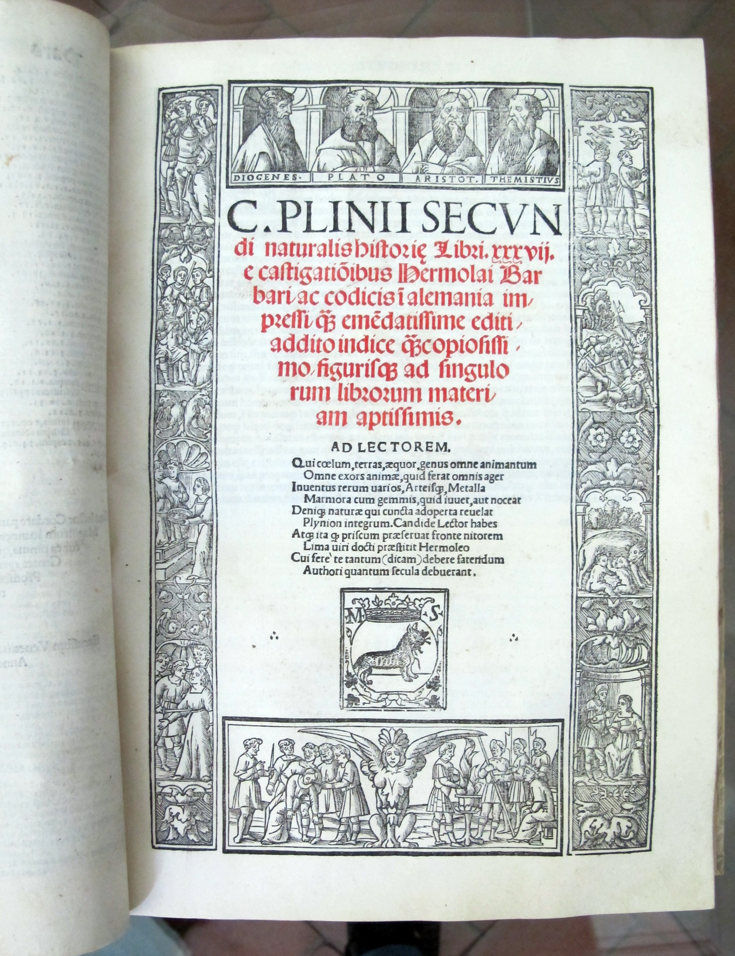 Biblioteca Malatestiana - MIBAC This is a photo of a monument which is part of cultural heritage of Italy.